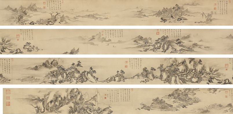 山水図巻 會津八一コレクション 近世書画